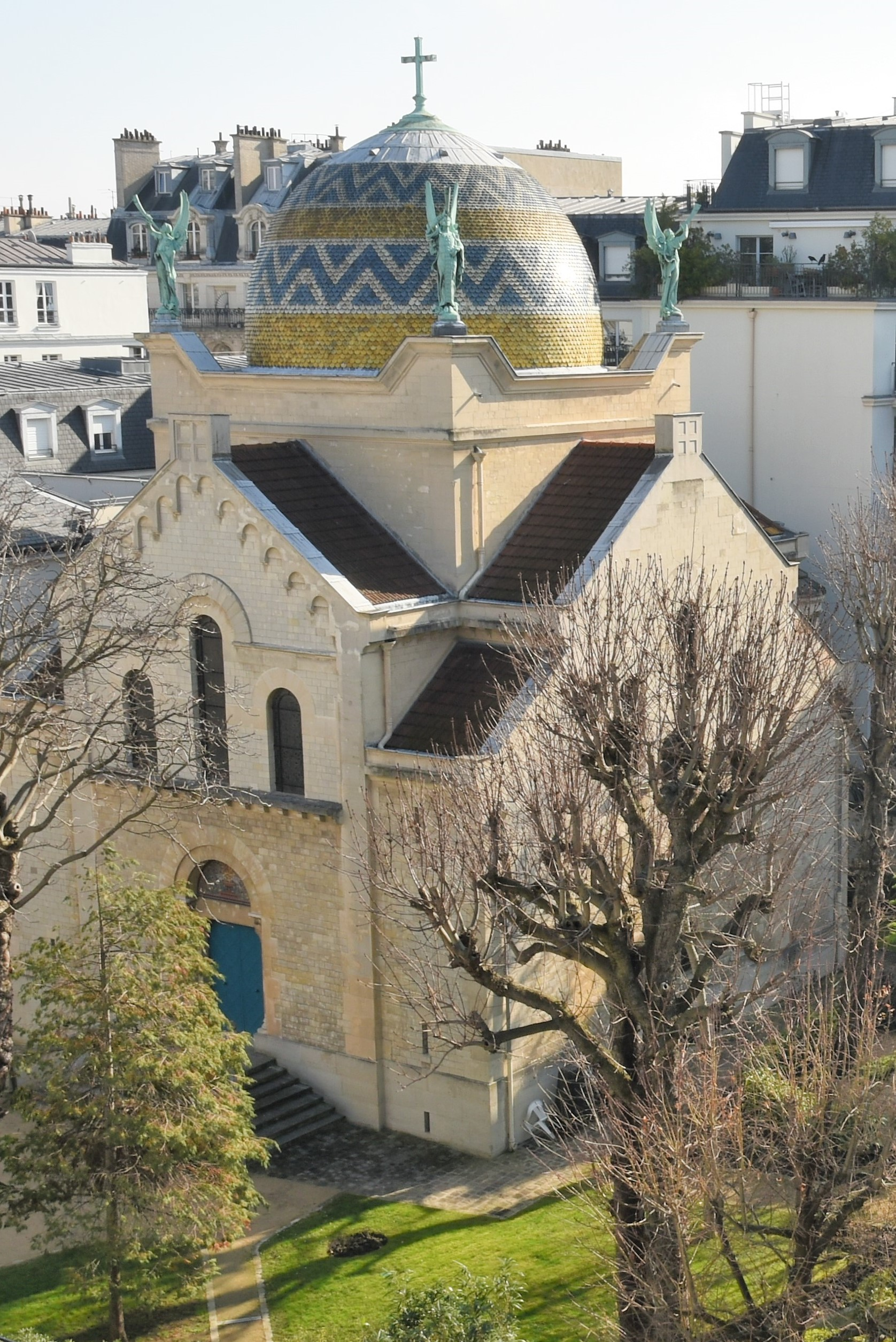 La chapelle des Sœurs auxiliatrices se situe au 14 rue Saint-Jean-Baptiste-de-La-Salle, à Paris (6ème arrondissement), dans la maison-mère de la congrégation religieuse des Sœurs auxiliatrices des âmes du Purgatoire.